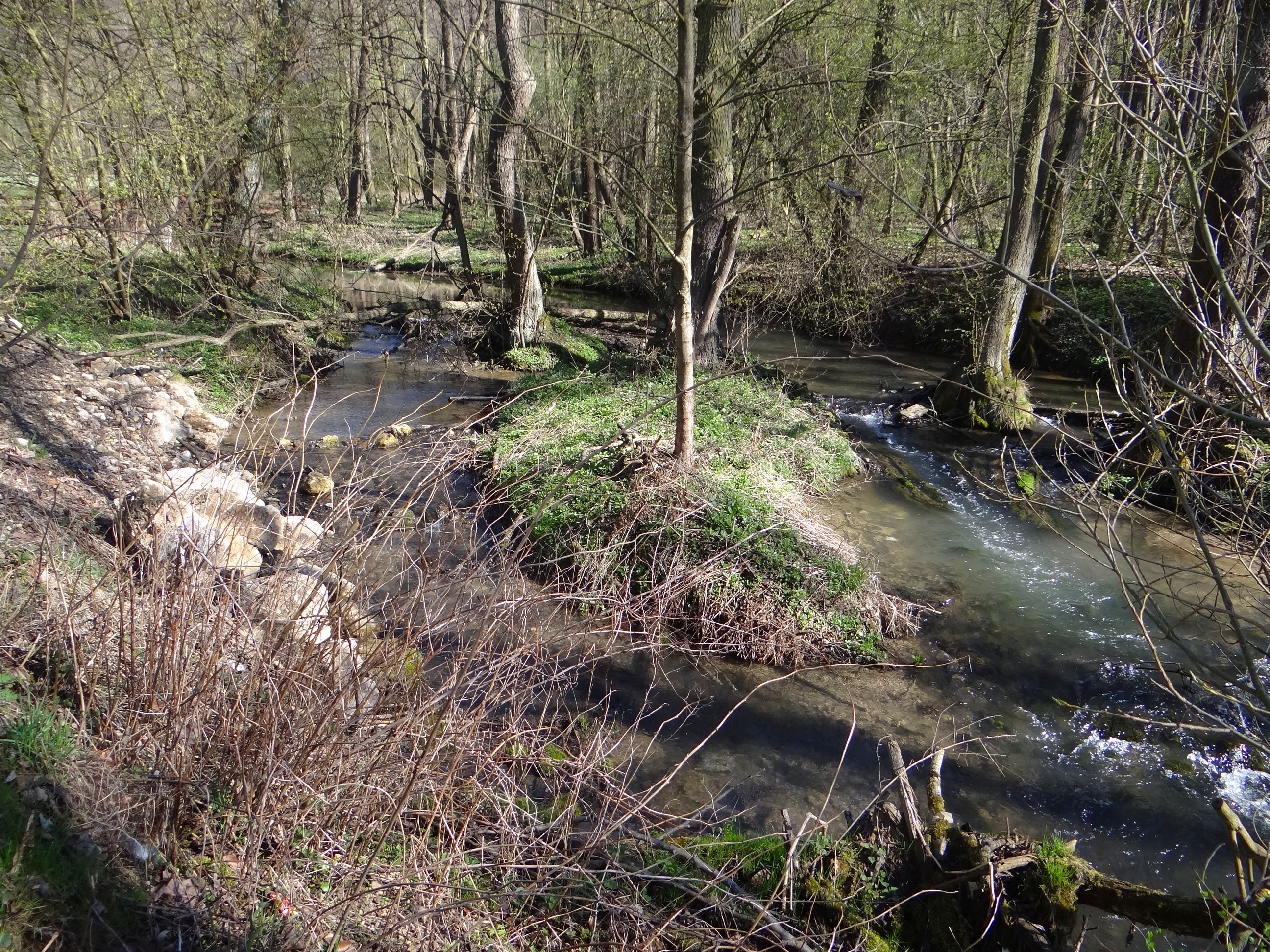 Rzeka Prądnik w Prądniku Korzkiewskim